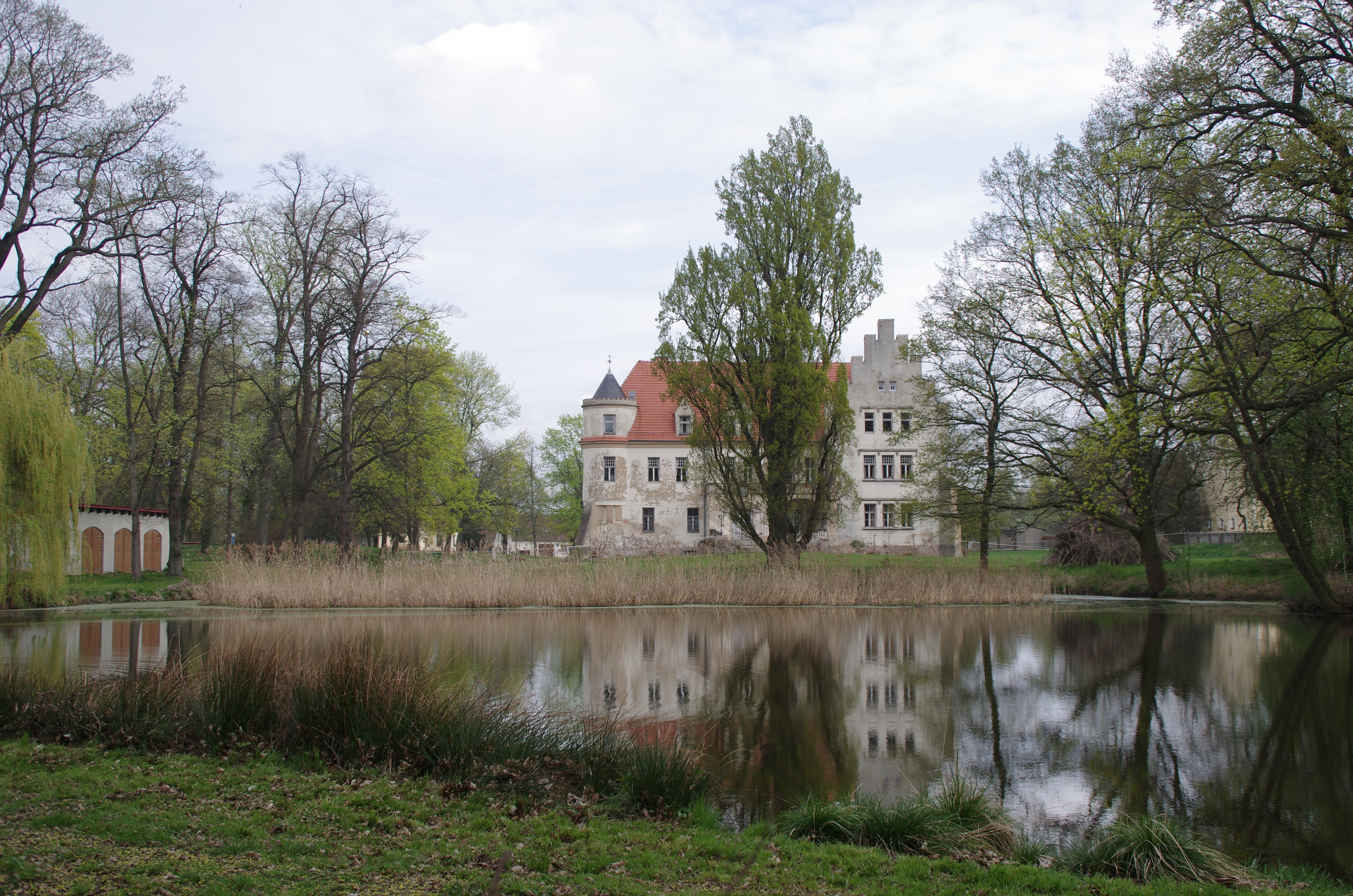 Lebusa in Brandenburg. Das Gebäude auf dem Bild steht unter Denkmalschutz.